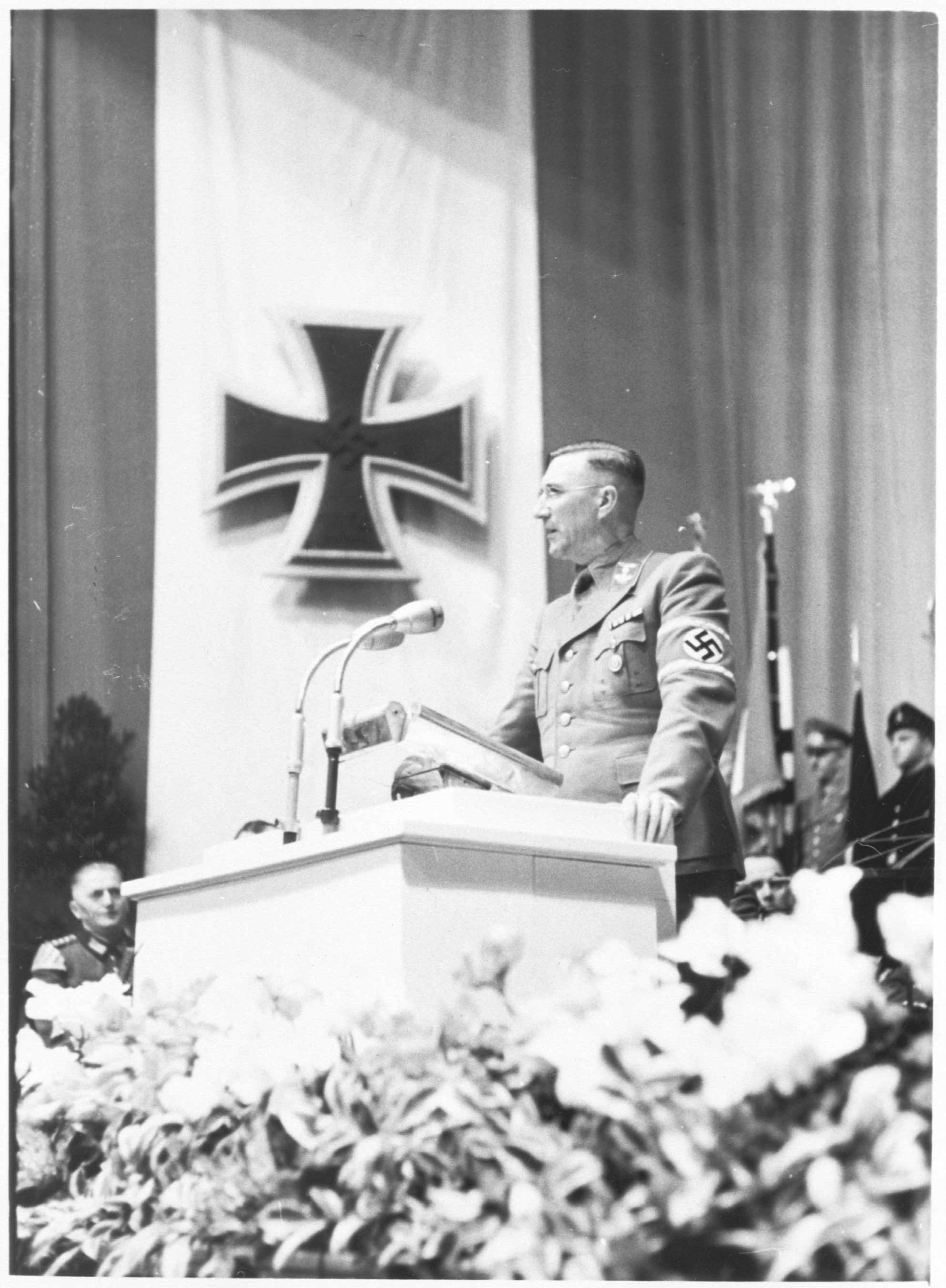 Wilhelm Friedrich Adolf (Willi) Ritterbusch (Werdau, 3. Juli 1892 – 10. April 1981), Gauleiter NSDAP, 1933 Kreisleiter in Mersebur, in 1940/1941 Beauftragte des Reichskommissars für die besetzten Niederlande für die Provinz Nordbrabant, 1941/1943 Leiter der Abteilung II B in der Parteikanzlei der NSDAP, 1943/1945 Generalkommissar zur besonderen Verwendung in den Niederlanden.